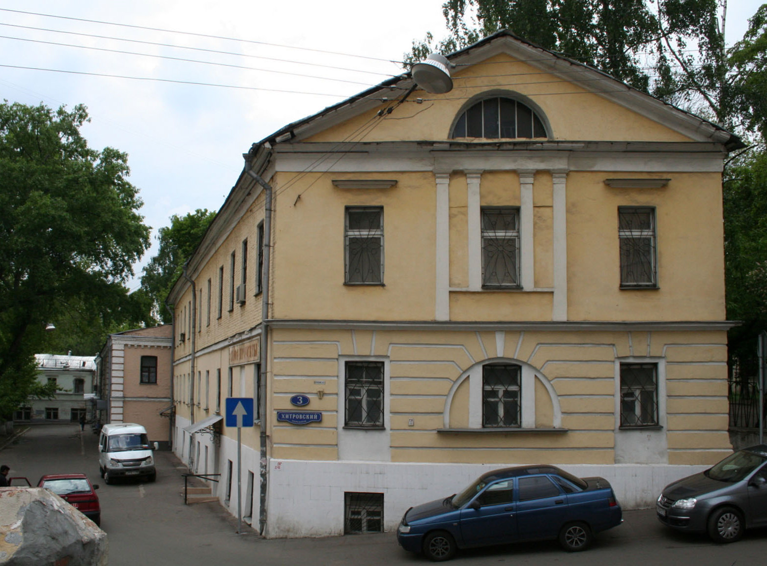 Флигель усадьбы Лопухиных - Буниных, в котором родился композитор А.Н.Скрябин.